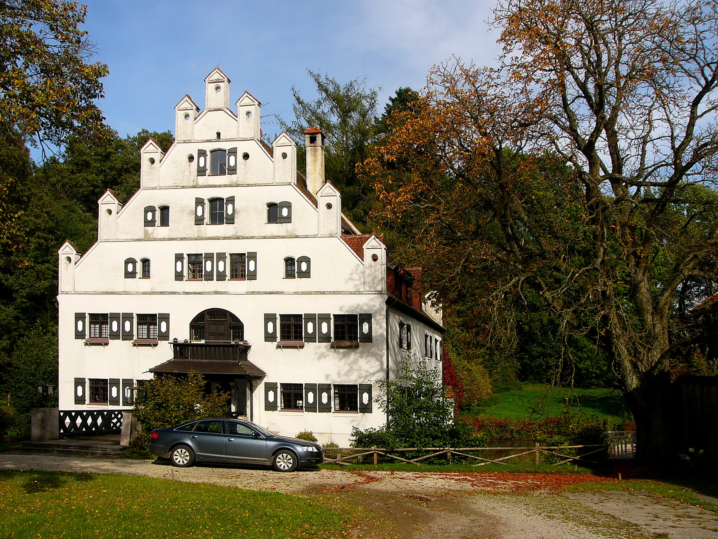 Ehemaliges Herrenhaus von Gut Holzen; schlossartiger, zweigeschossiger Putzbau mit dreigeschossigem Satteldach, Giebelfassaden mit Zinnenbekrönung, errichtet 1604, bezeichnet durch Inschrifttafel (1905 an Nordseite versetzt), Umbau 1905 durch Louis von Heemskerk.This is a photograph of an architectural monument.